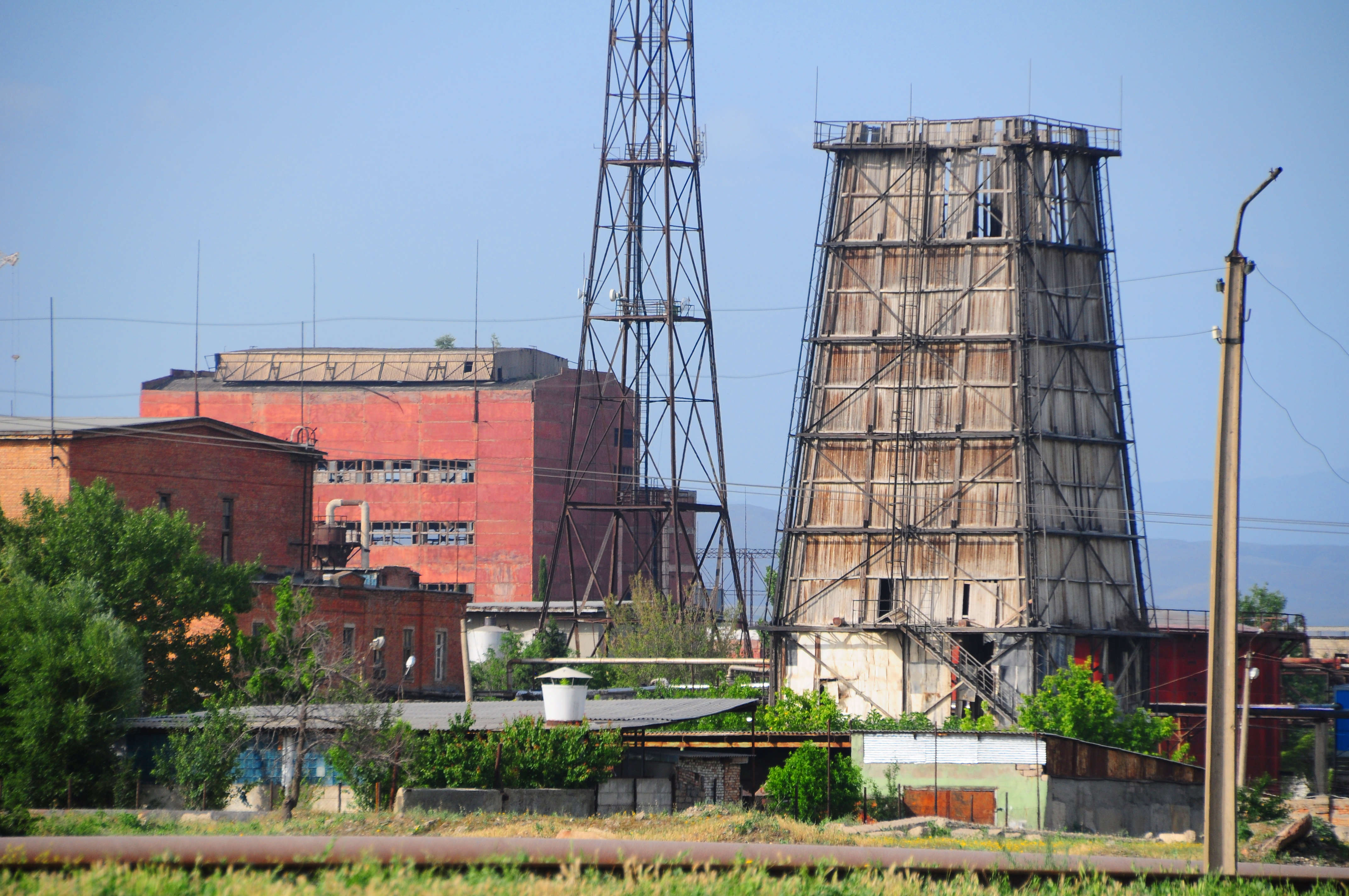 17677 Rustavi